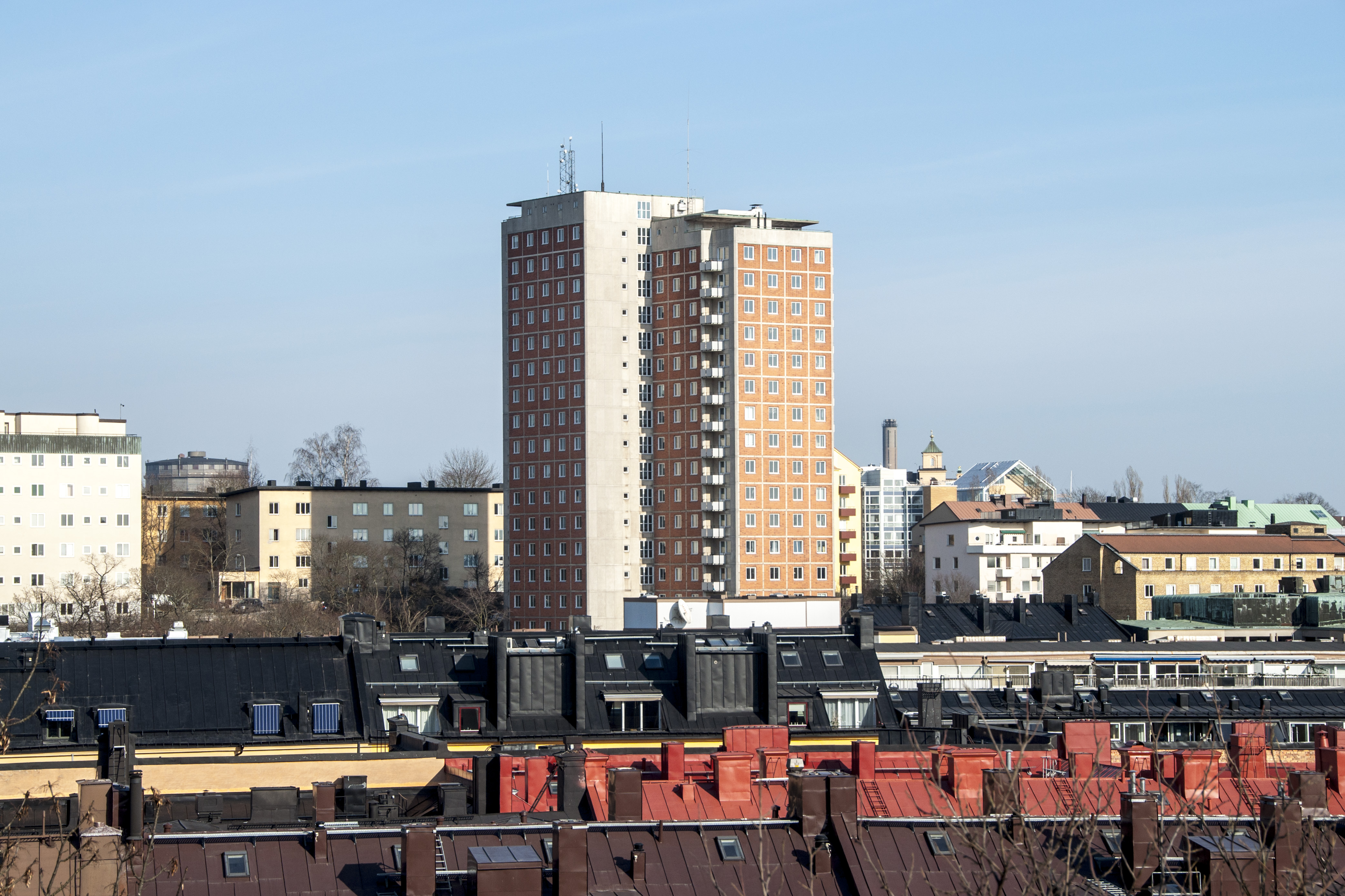 Körsbärsbladet 3, Körsbärsvägen 9, Nybyggnadsår 1956 - 1958, AB Studenthemmet i Stockholm (Byggherre) Dag Ribbing (Arkitekt) Reinhold Gustafsson (Byggmästare)